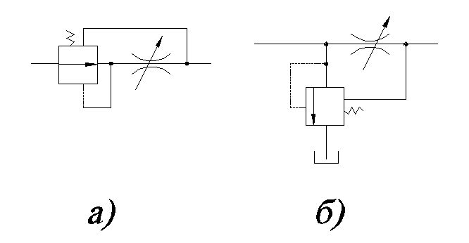 СХЕМЫ РЕГУЛЯТОРОВ РАСХОДА